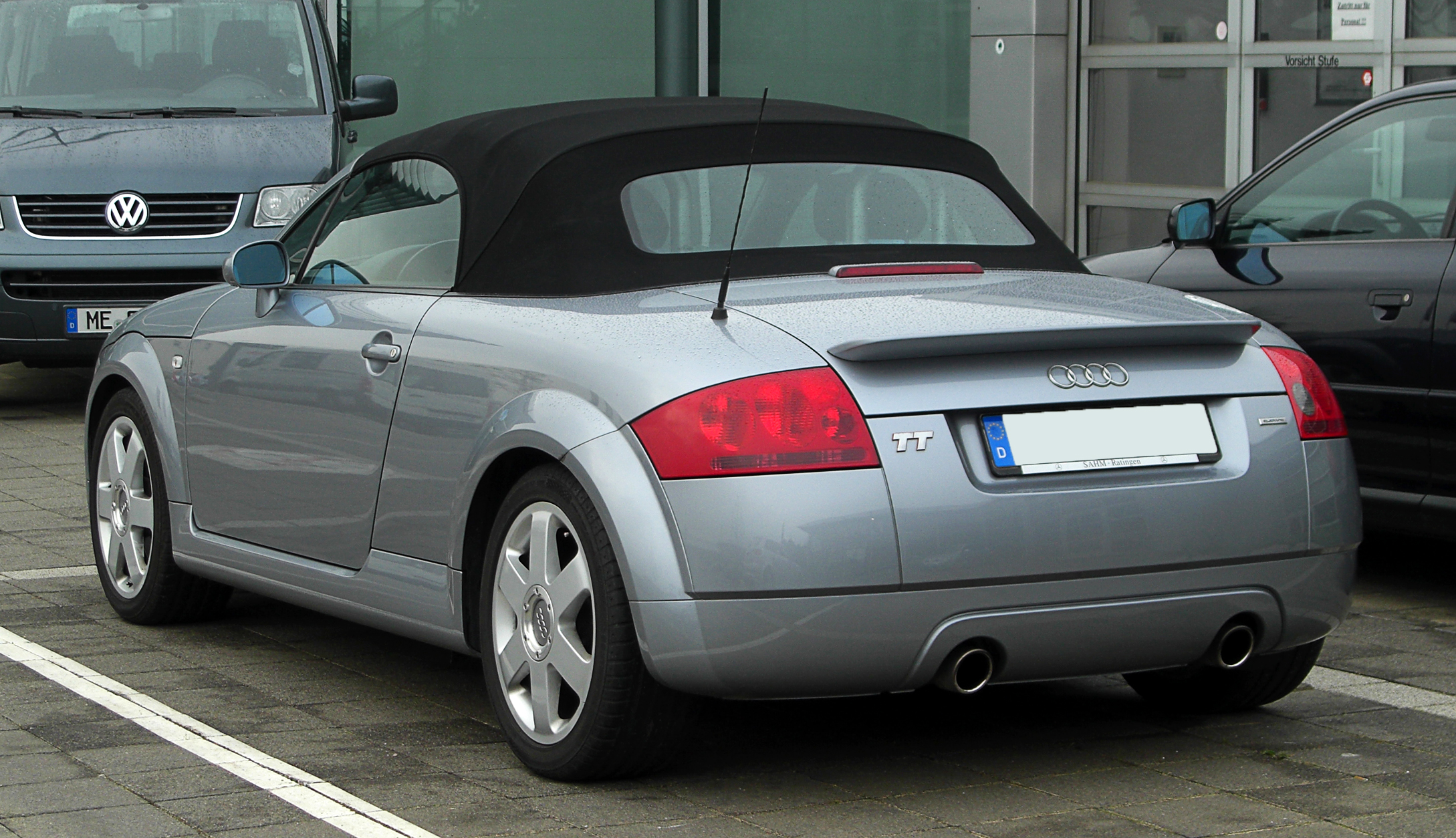 Audi TT Roadster 1.8 T quattro (8N, Facelift)